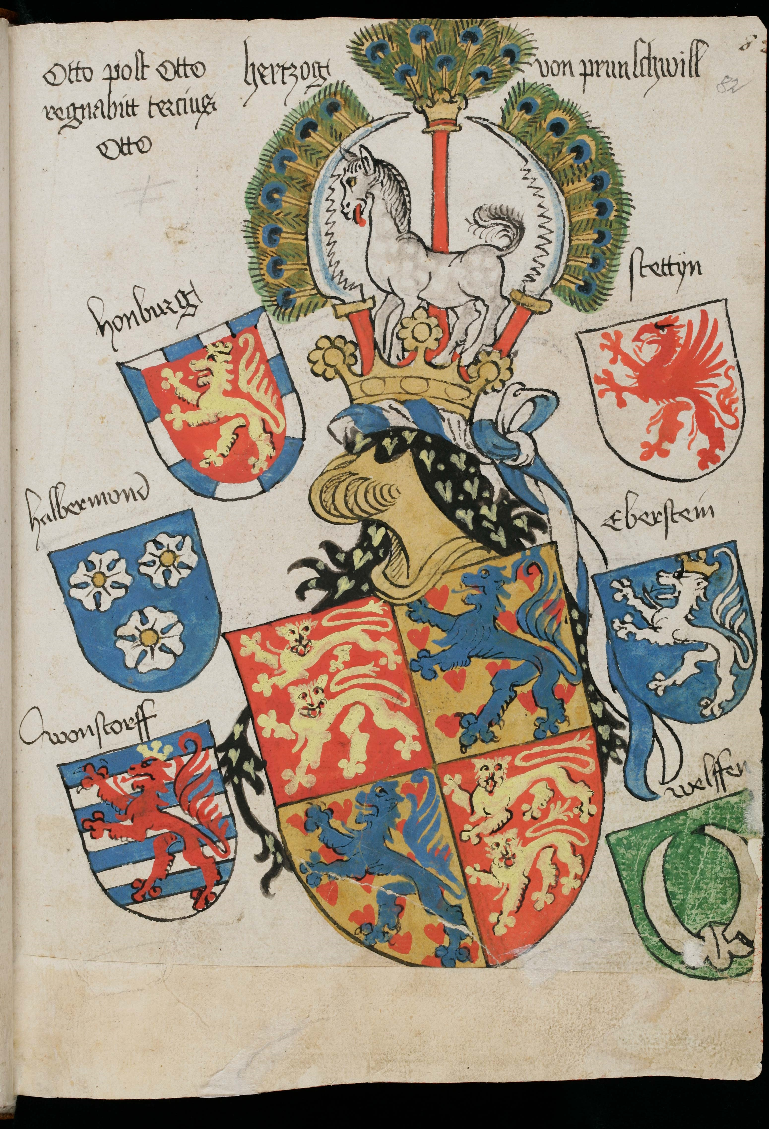 Wappenbuch des St. Galler Abtes Ulrich Rösch; Stiftsbibliothek St. Gallen, Cod. sang. 1084 Wappen